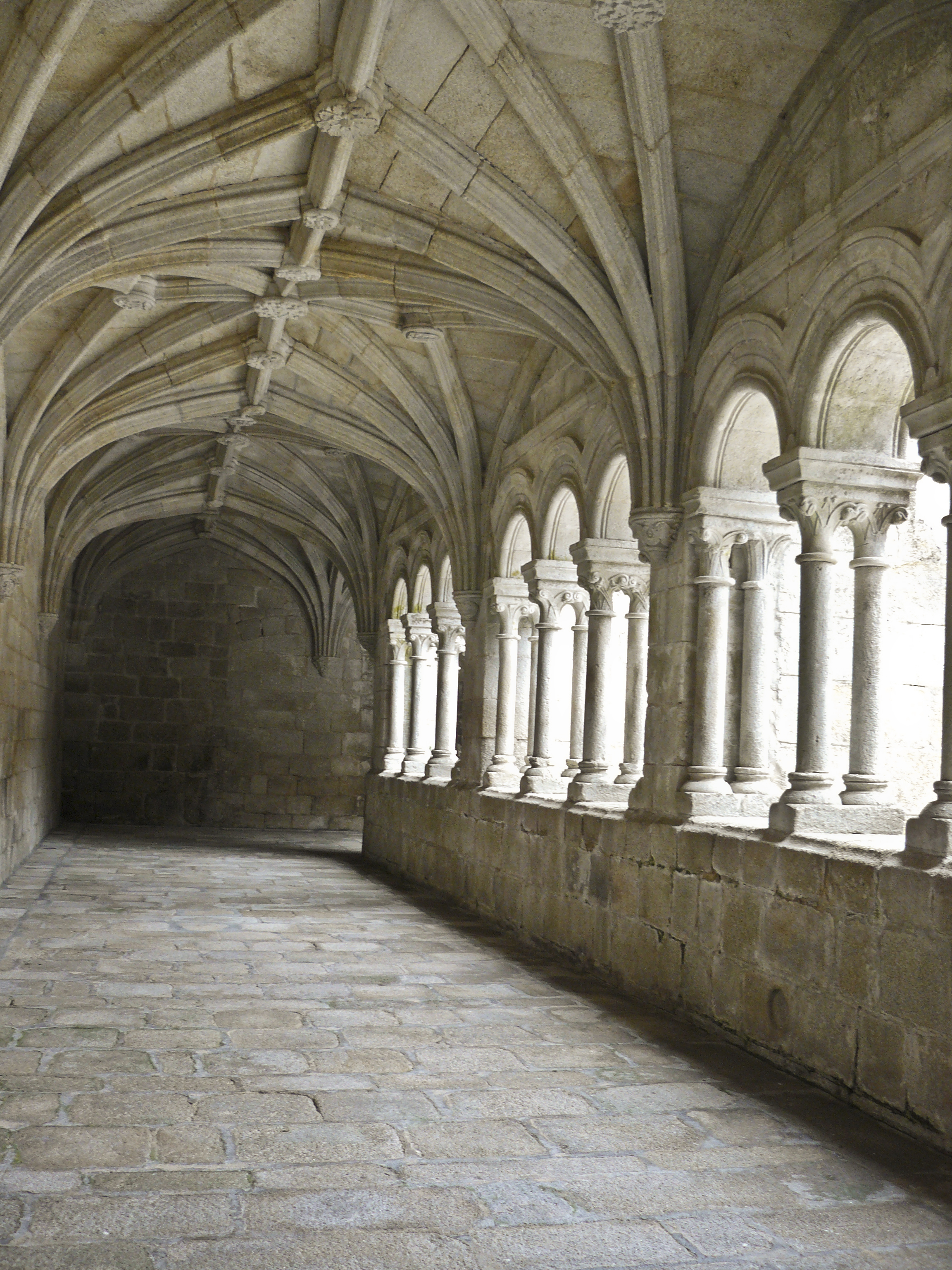 Claustro do Mosteiro de San Estevo de Ribas do Sil, Nogueira de Ramuín